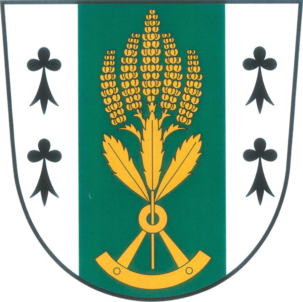 Znak obce Jeřišno